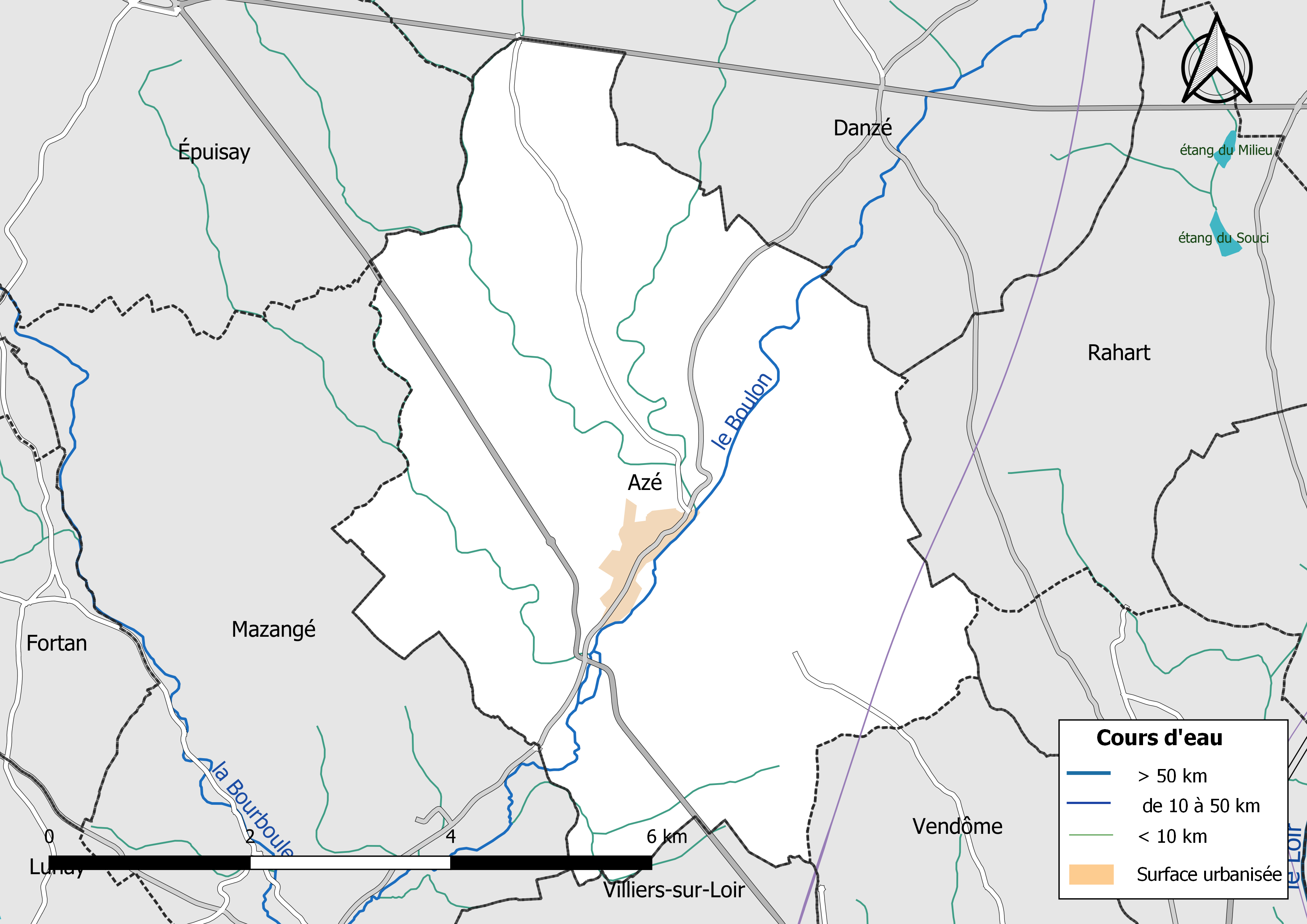 Carte du réseau hydrographique de la commune d'Azé (Loir-et-Cher) (France).